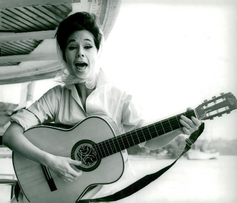 Foto på Barbro Hörberg infört i Svenska Dagbladet 1964-11-03 s. 26.